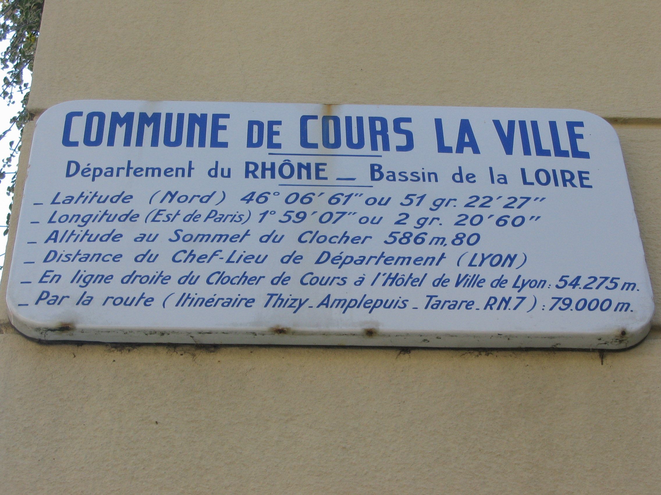 Cours la Ville, Rhône -- repères géographiques.